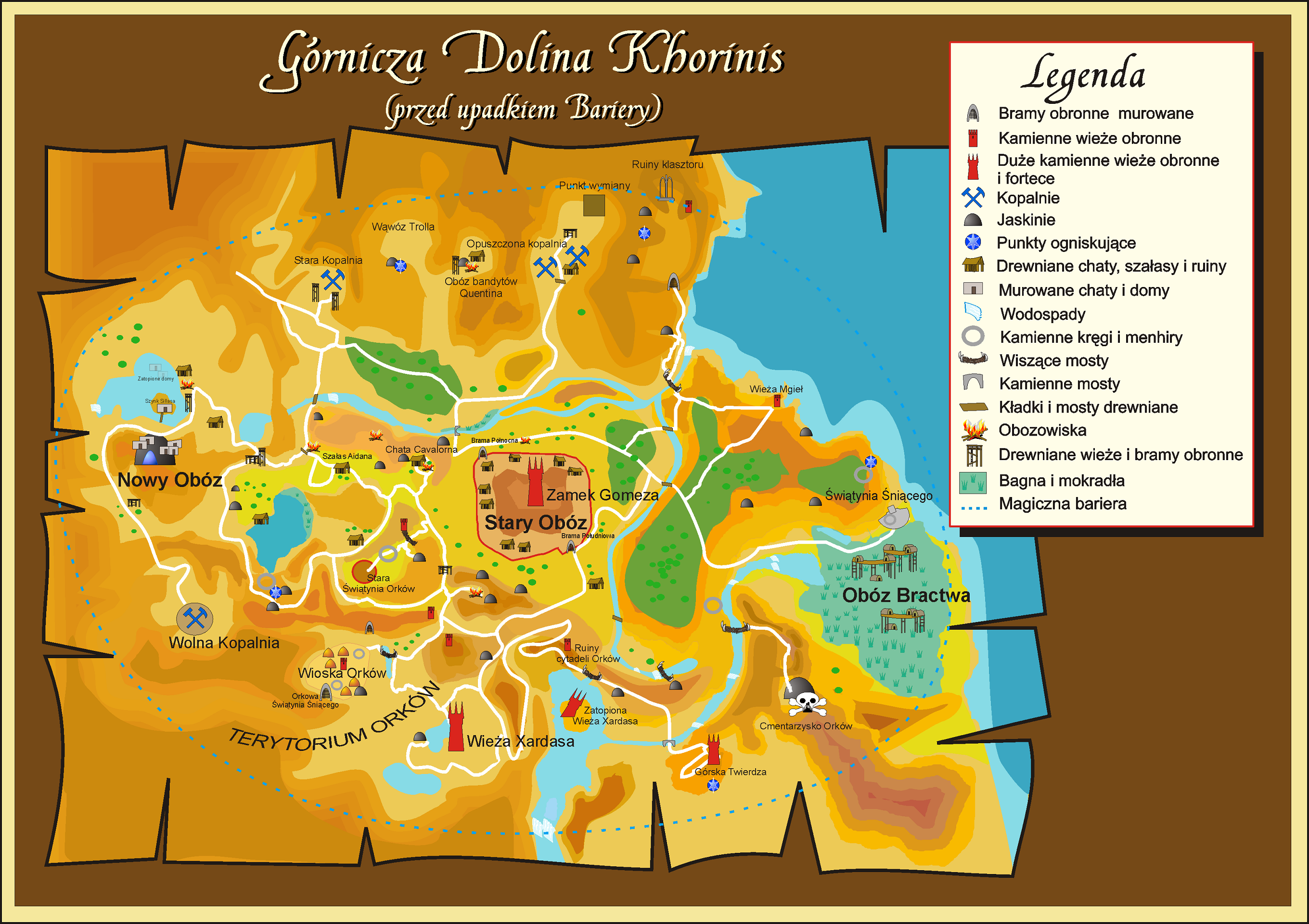 Mapa Górniczej Doliny Khorinis